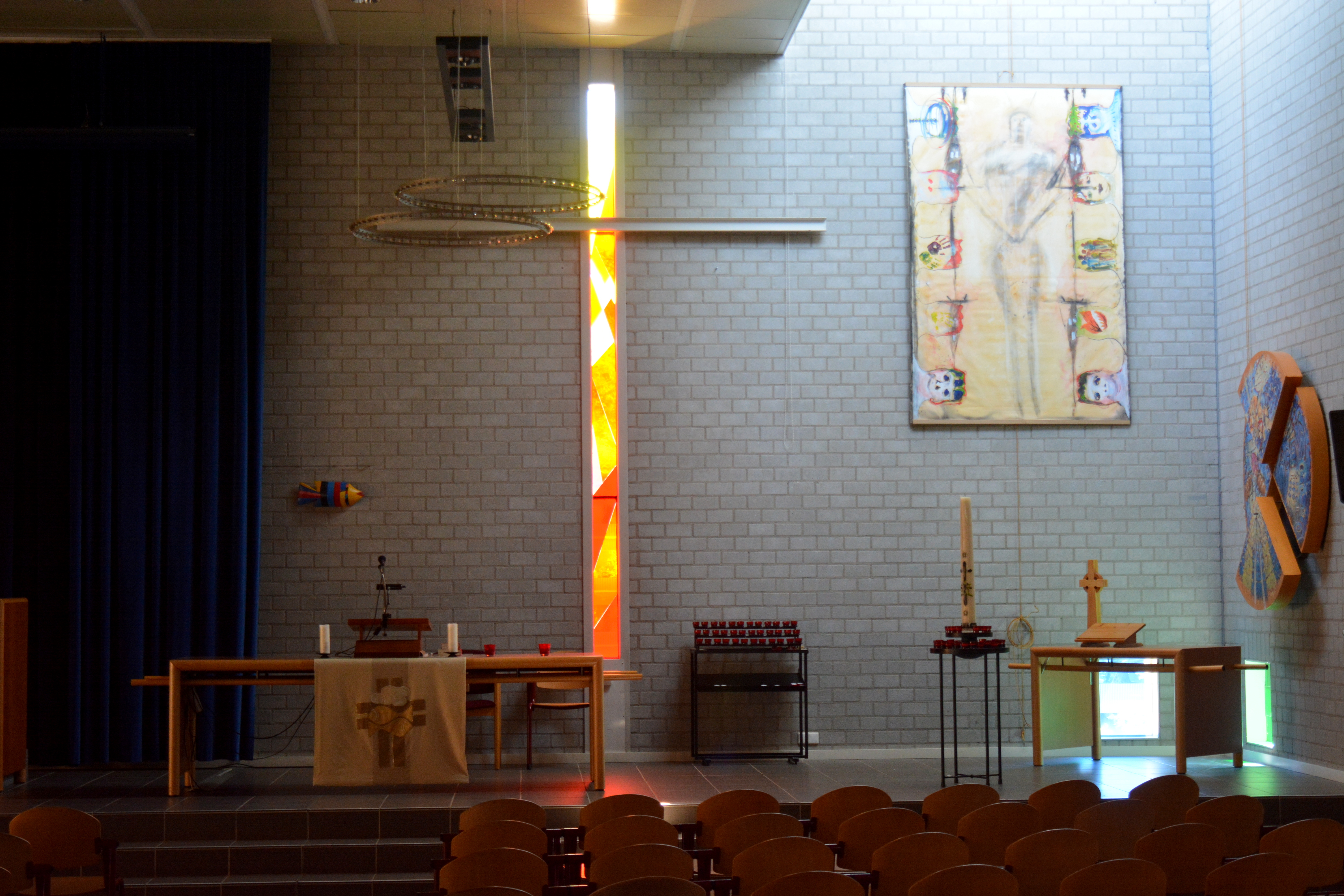 Leeuwarden, PKN-kerk De Schakel, liturgisch centrum